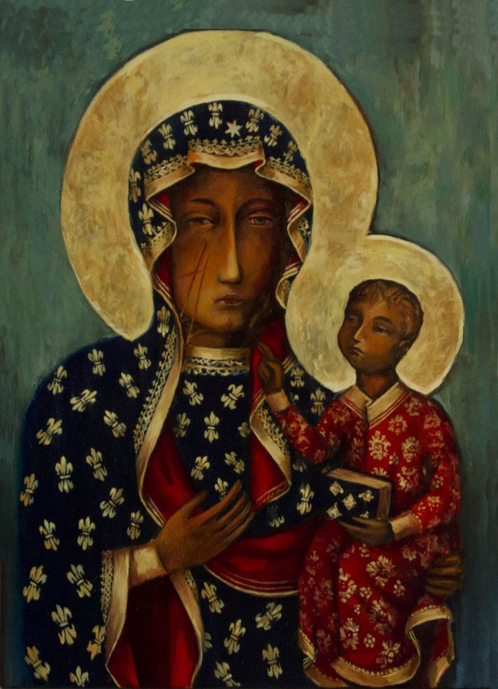 Nuestra Señora de Czestochowa